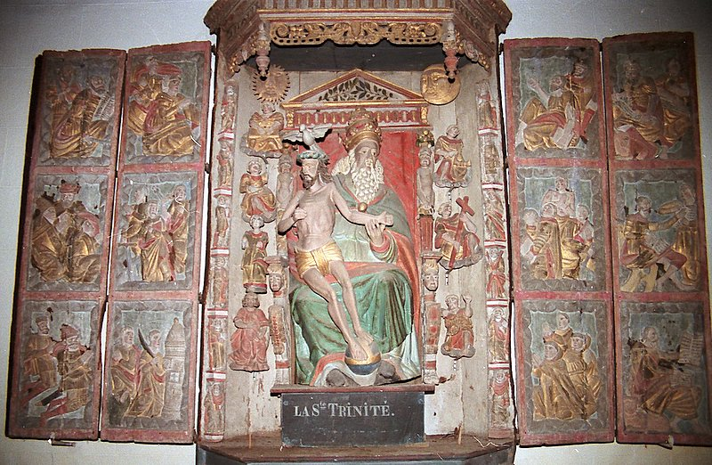 église la Feuillée, denez goasguen.